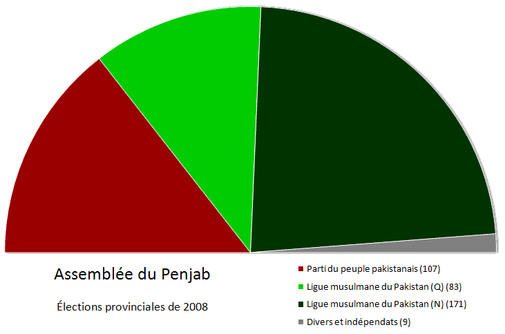 L'Assemblée du Penjab après les élections provinciales de 2008